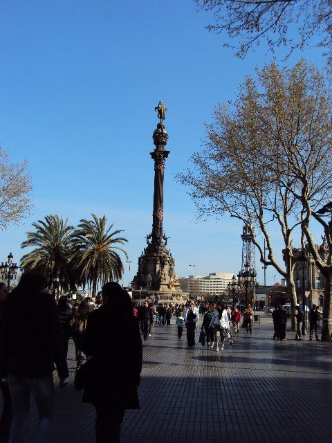 Vista desde La Rambla